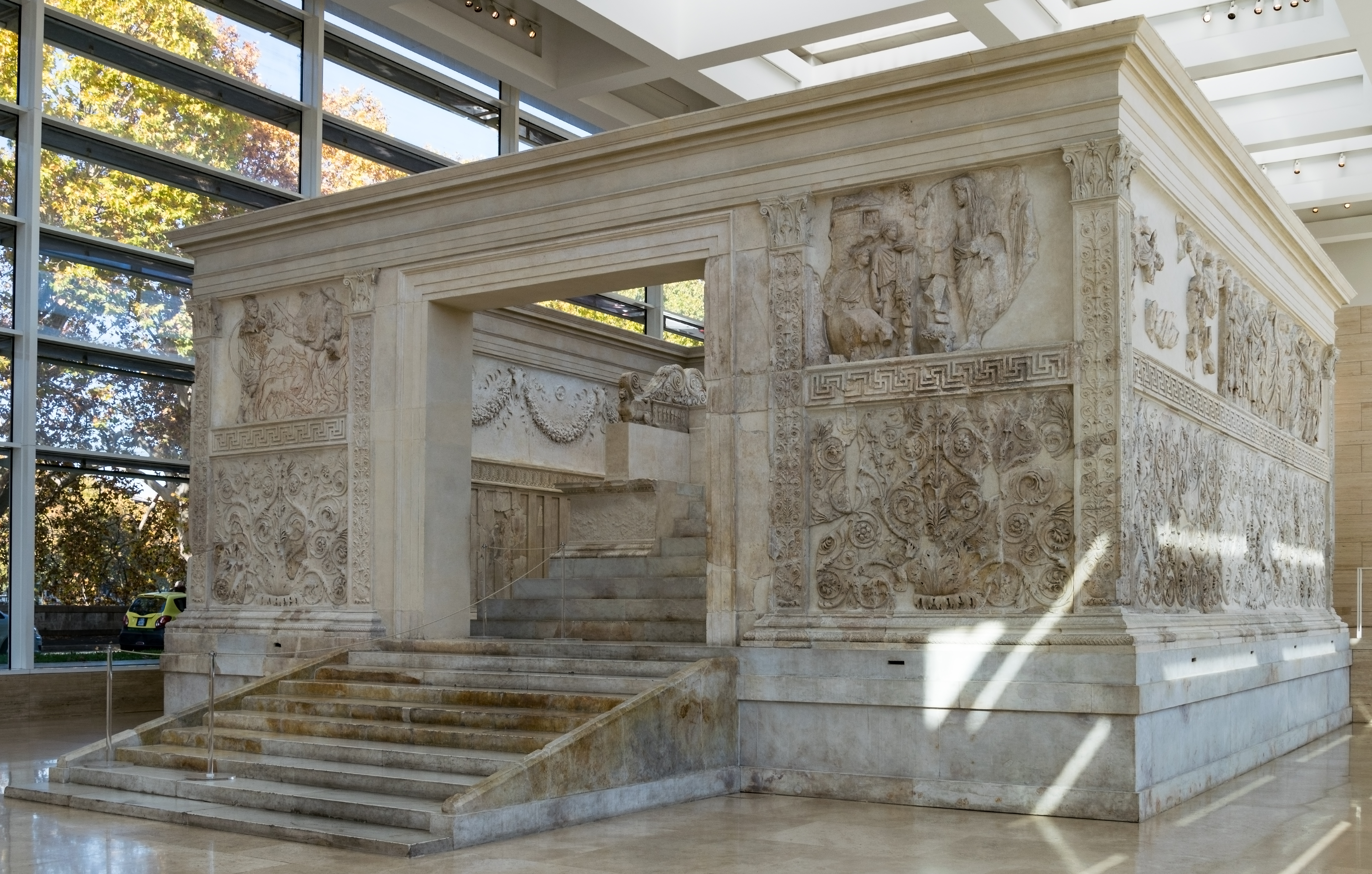 Die Frontseite der Ara Pacis Augustae